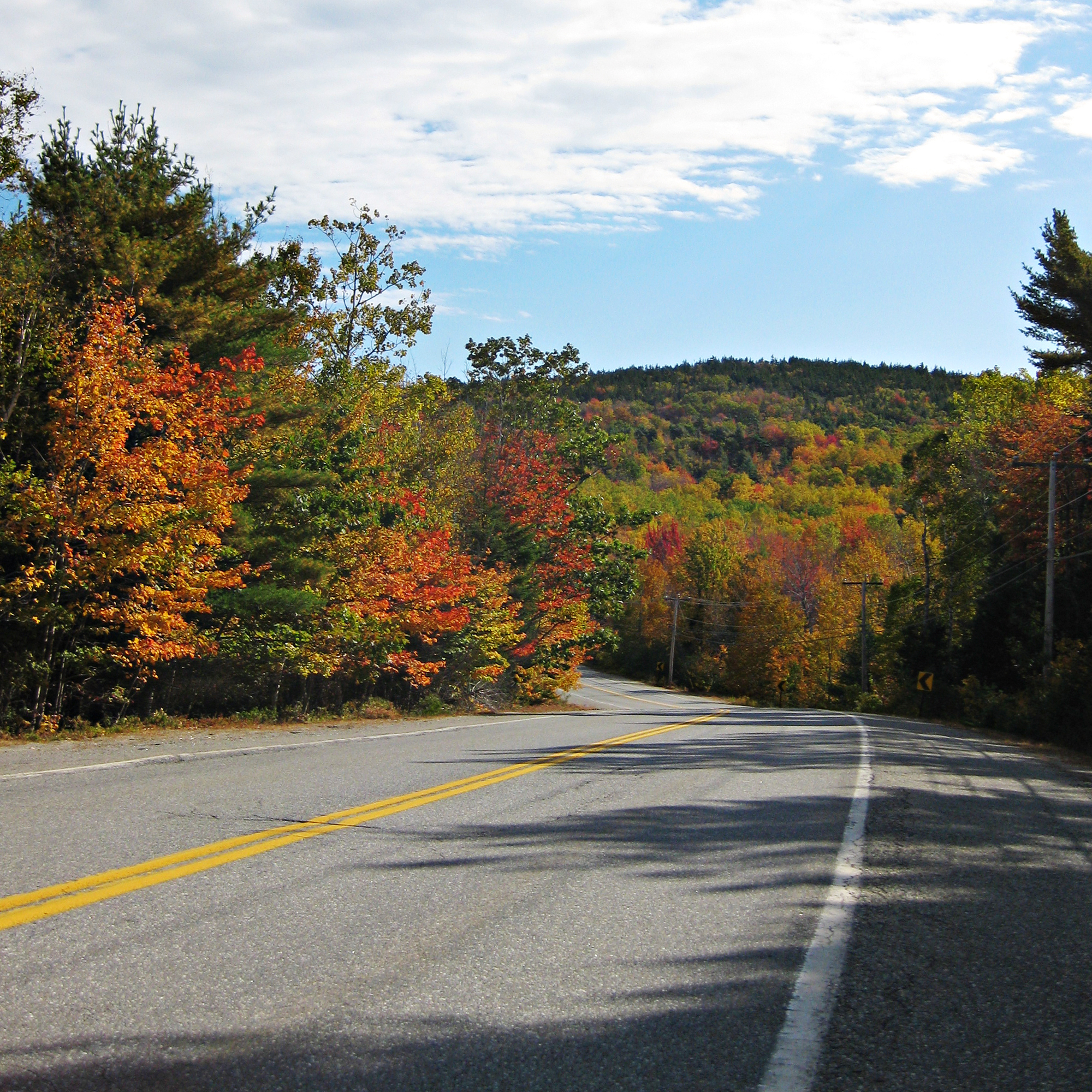 Fall Colors